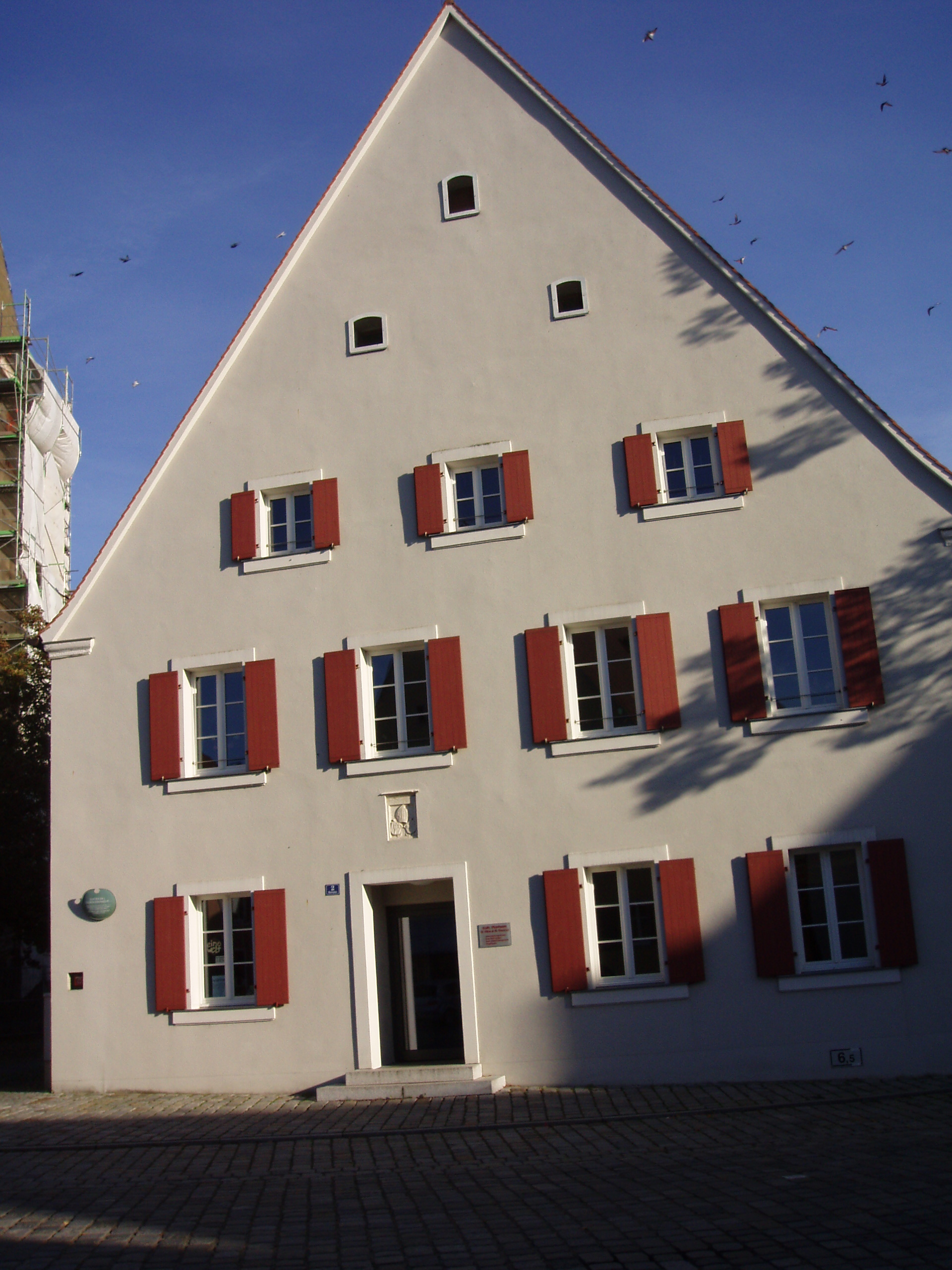 der "Kasten" in Herrieden